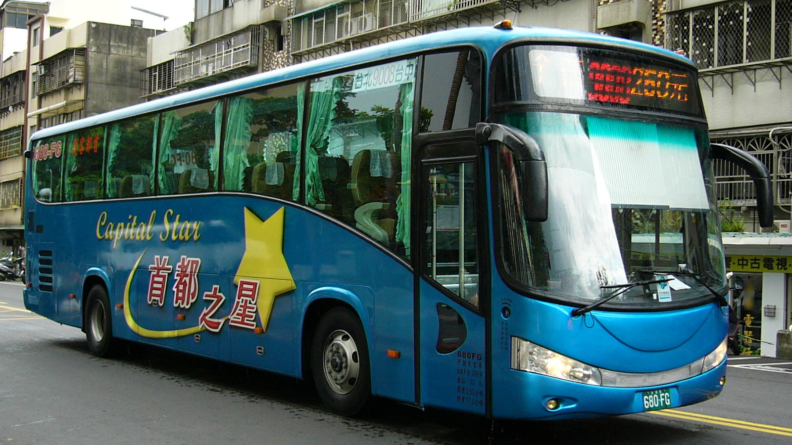 首都客運首都之星680-FG右前方外觀，車型為Fuso RP517PL。